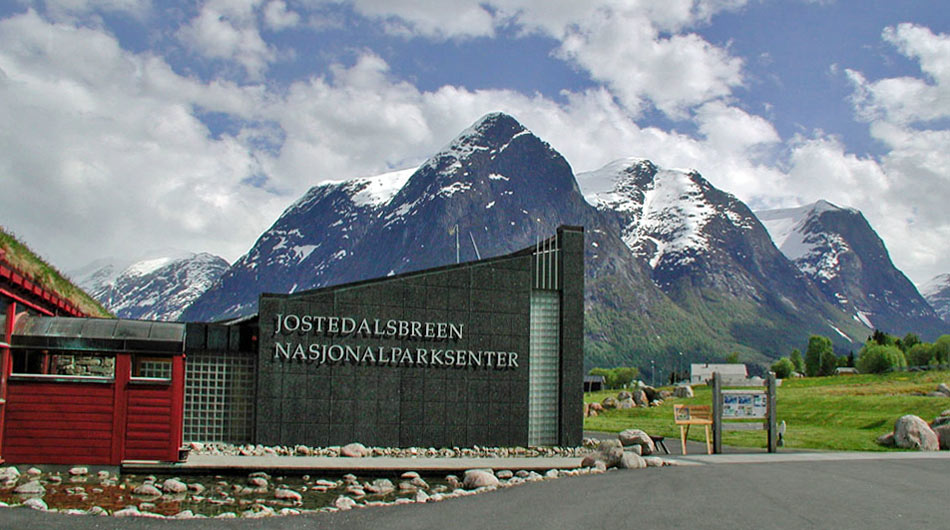 Jostedalsbreen Nasjonalparksenter